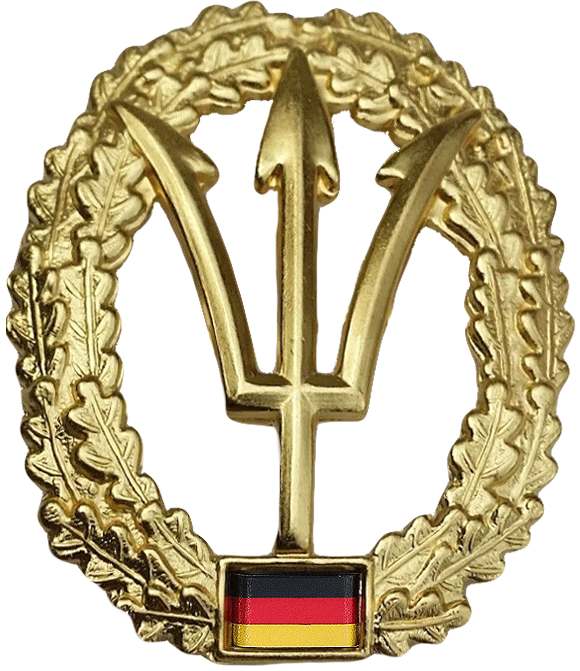 Barettabzeichen der Kommando Spezialkräfte Marine der Bundeswehr Barettfarbe: Marineblau Maße: Hoch: 53mm Breit: 46mm Ausführung: altsilber, Metall